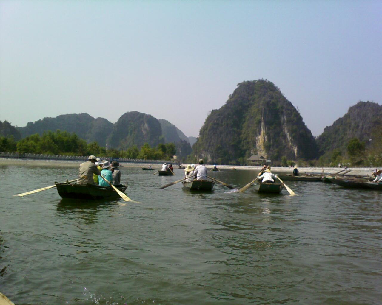 Tam Coc ,Ninh Binh ,Vietnam